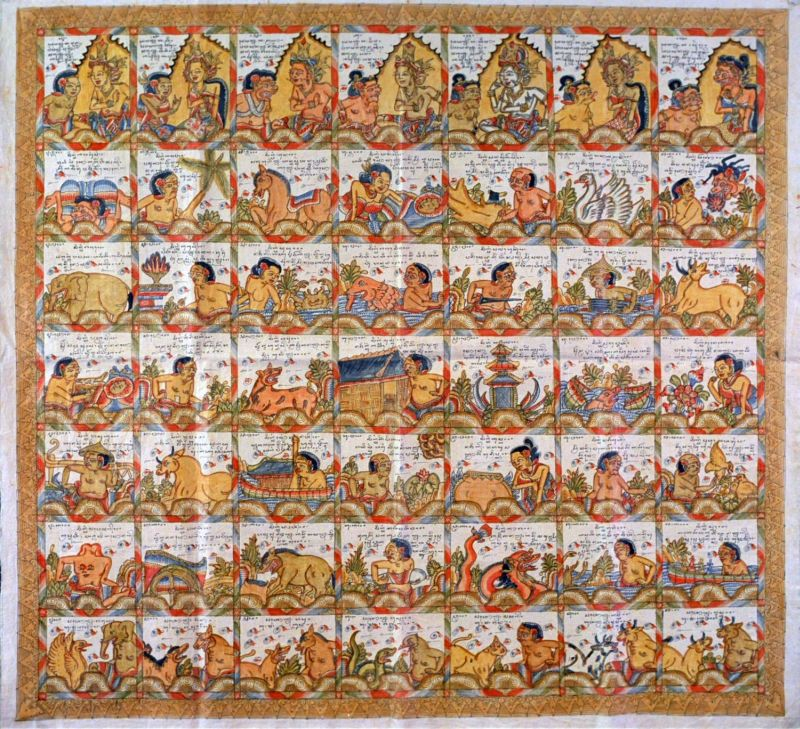 Kalender. Een Balinese kalender met geheel bovenaan een rij goden, van links naar rechts: Zondag: Indra, Maandag: Sri, Dinsdag: Brahma, Woensdag: Wisnu, Donderdag: Guru, Vrijdag: Giri Putri, Zaterdag: Durga. Katoenen kalenderdoek met Balinese taferelen Unknown language: Palalintangan